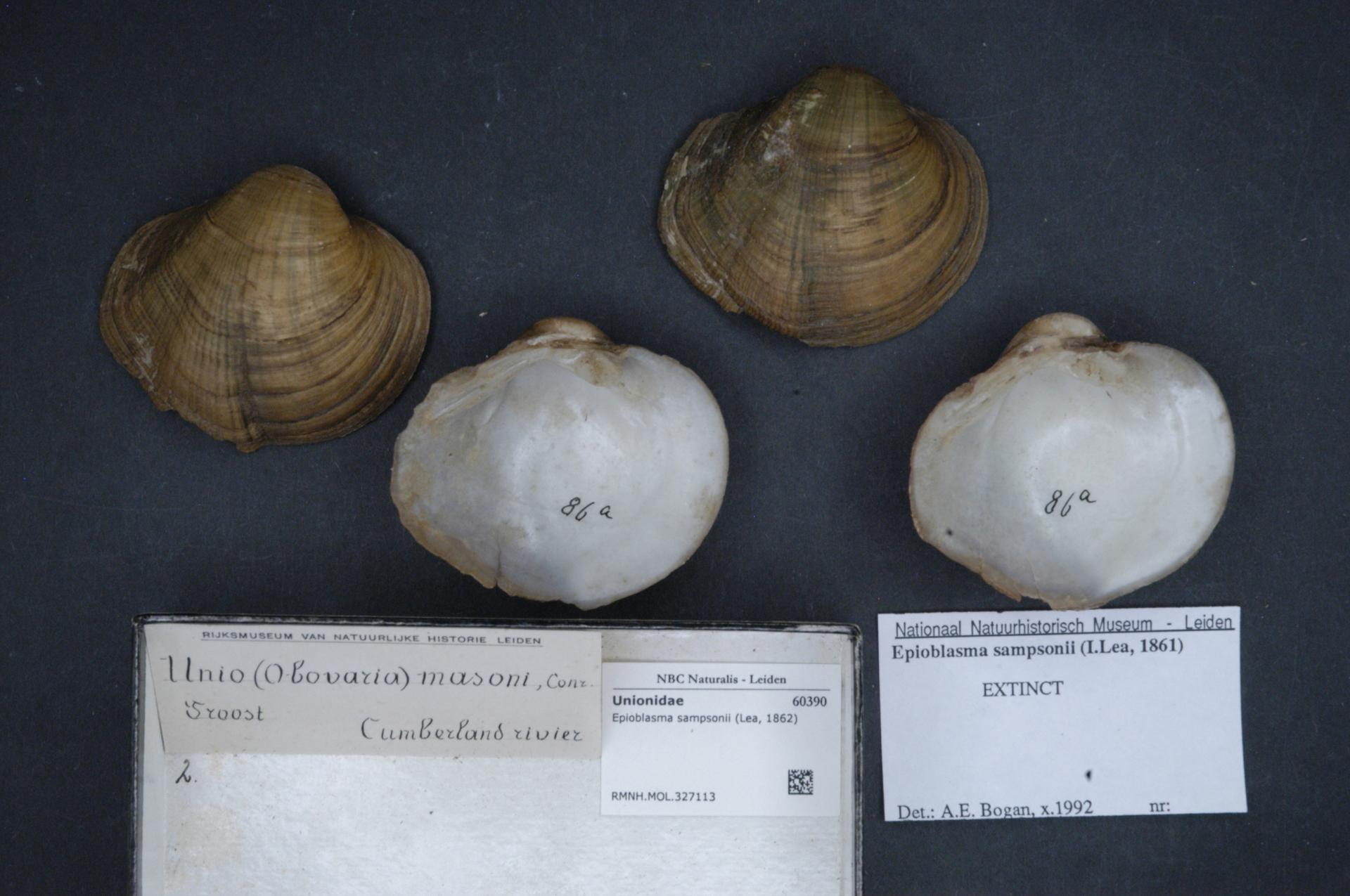 Epioblasma sampsonii (Lea, 1862)